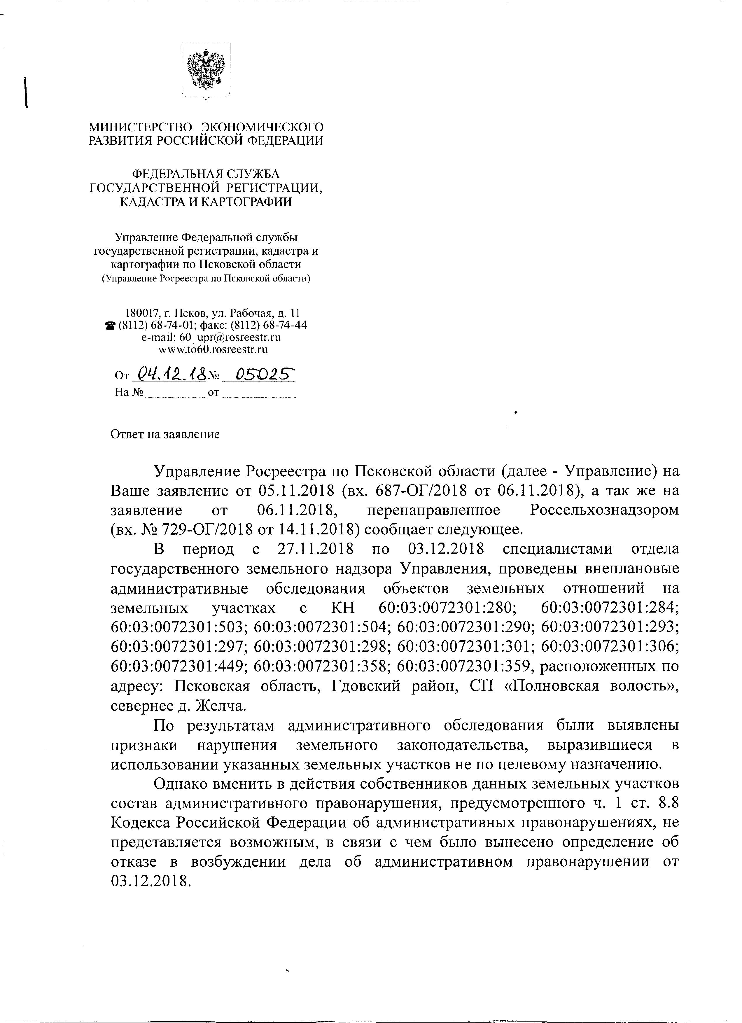 застрой сельхоз угодий